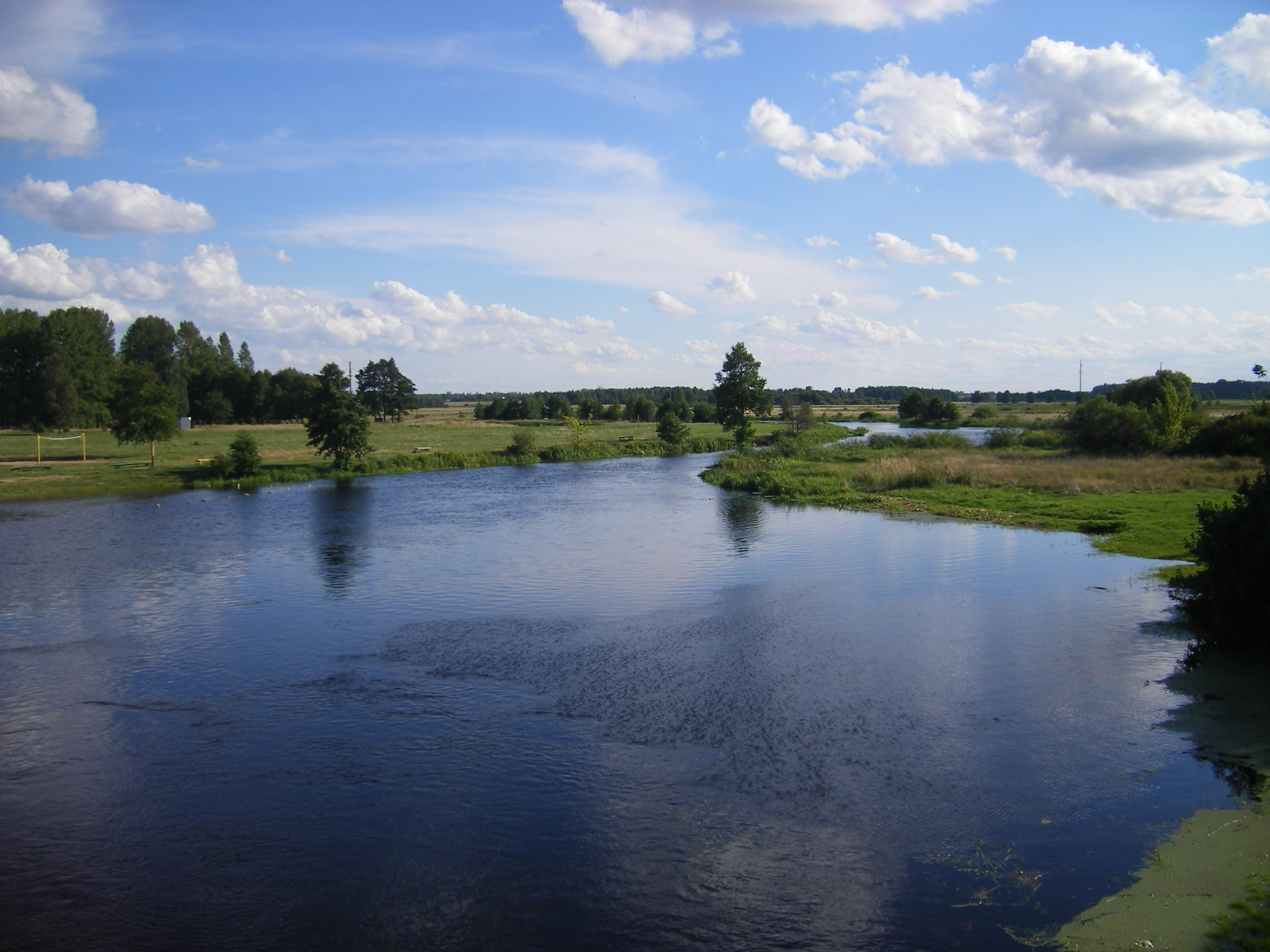 Lesnaya river, Kamyanets, Belarus